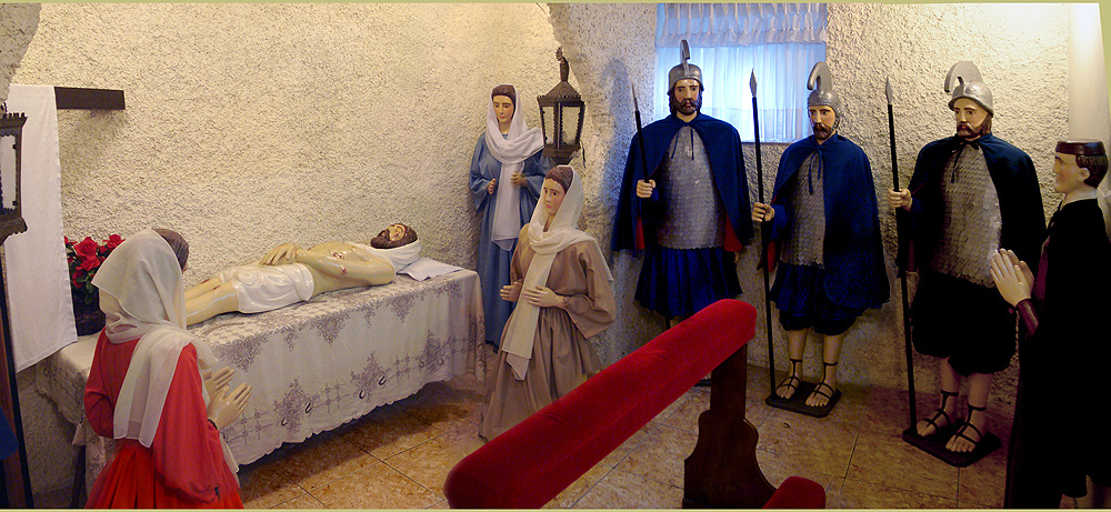 Cripta da Capela do Santo Sepulcro, Caxias do Sul, Brasil.